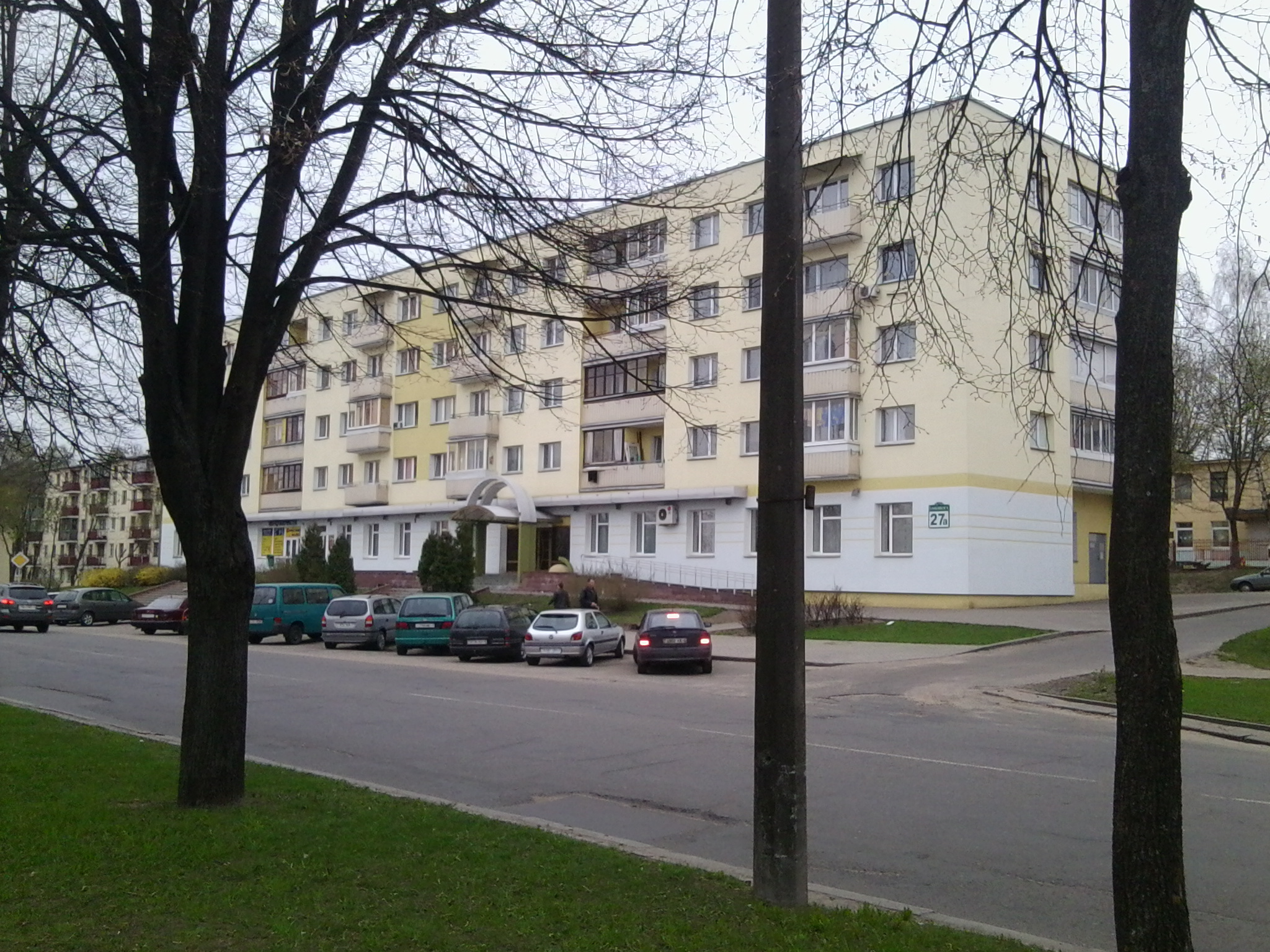 Улица Олега Кошевого - одна из улиц Тракторозаводского посёлка Партизанского района города Минска, названа в честь героя антифашистского подполья и героя СССР.